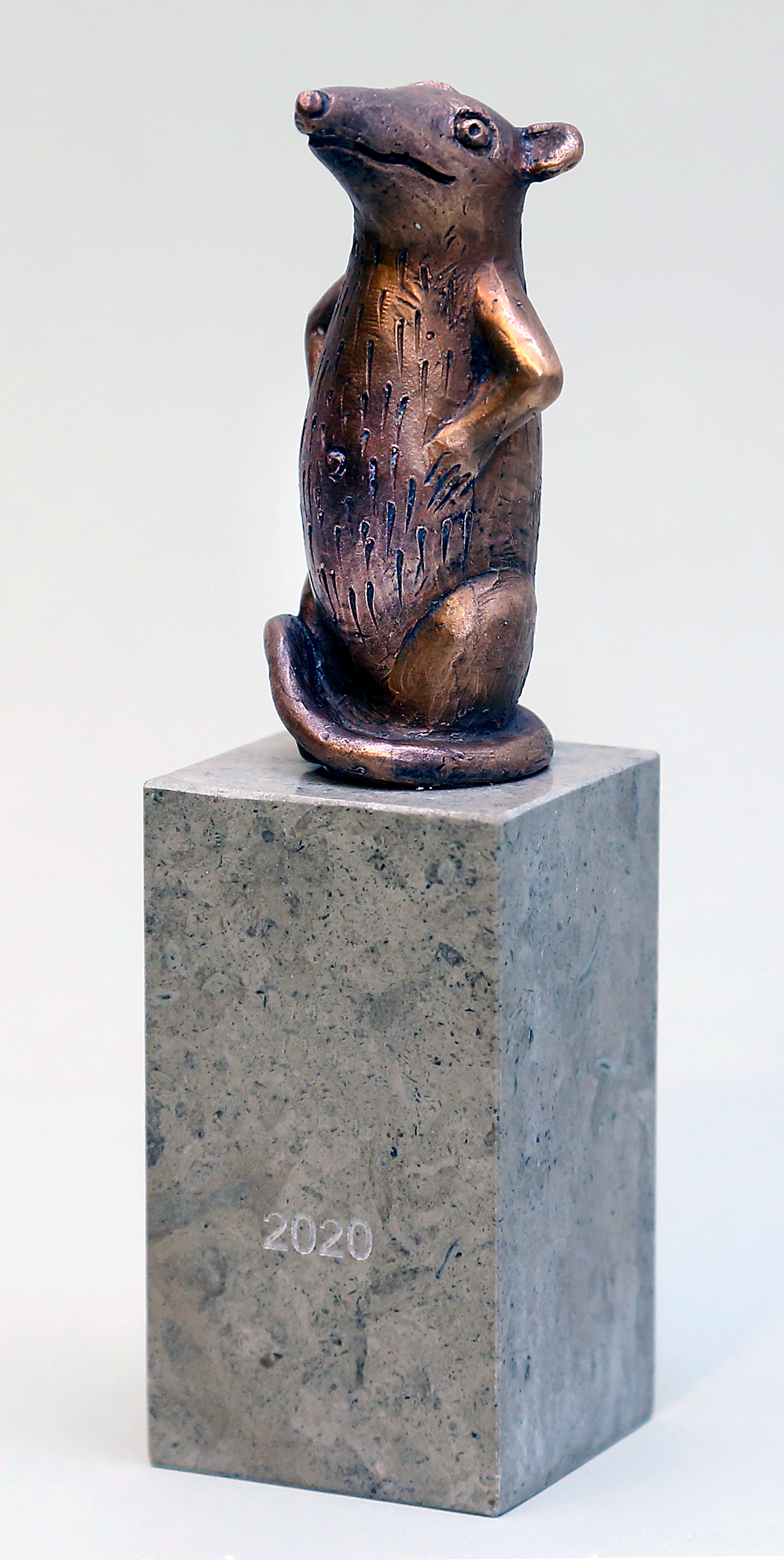 Muuseumirott, Eesti Muuseumide aastaauhindade aastapreemia